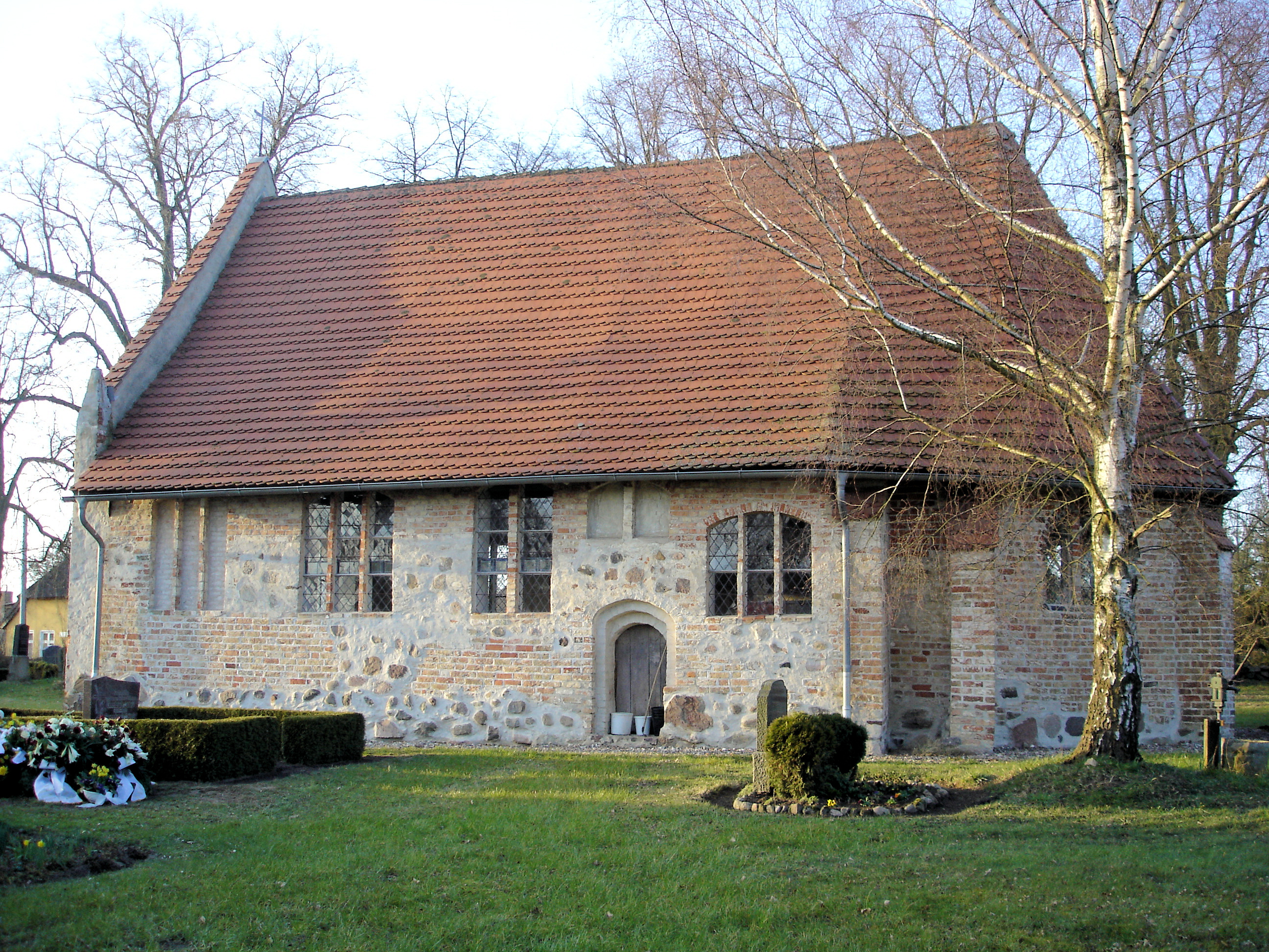 Kirche Rostocker Wulfshagen / Church in Rostocker Wulfshagen